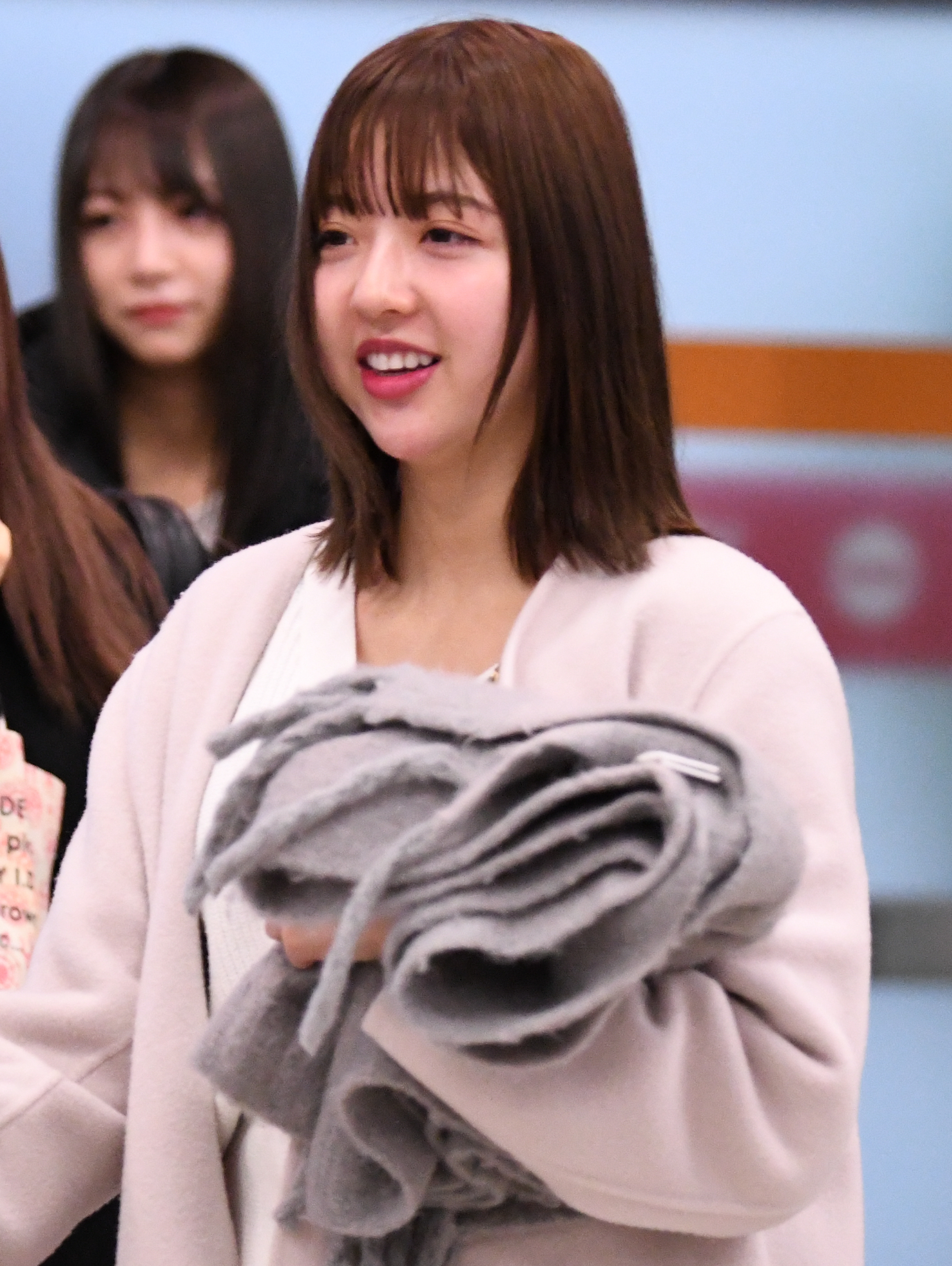 2020.01.18 乃木坂46「NOGIZAKA46 Live in Taipei 2020」抵達台灣@台北松山機場